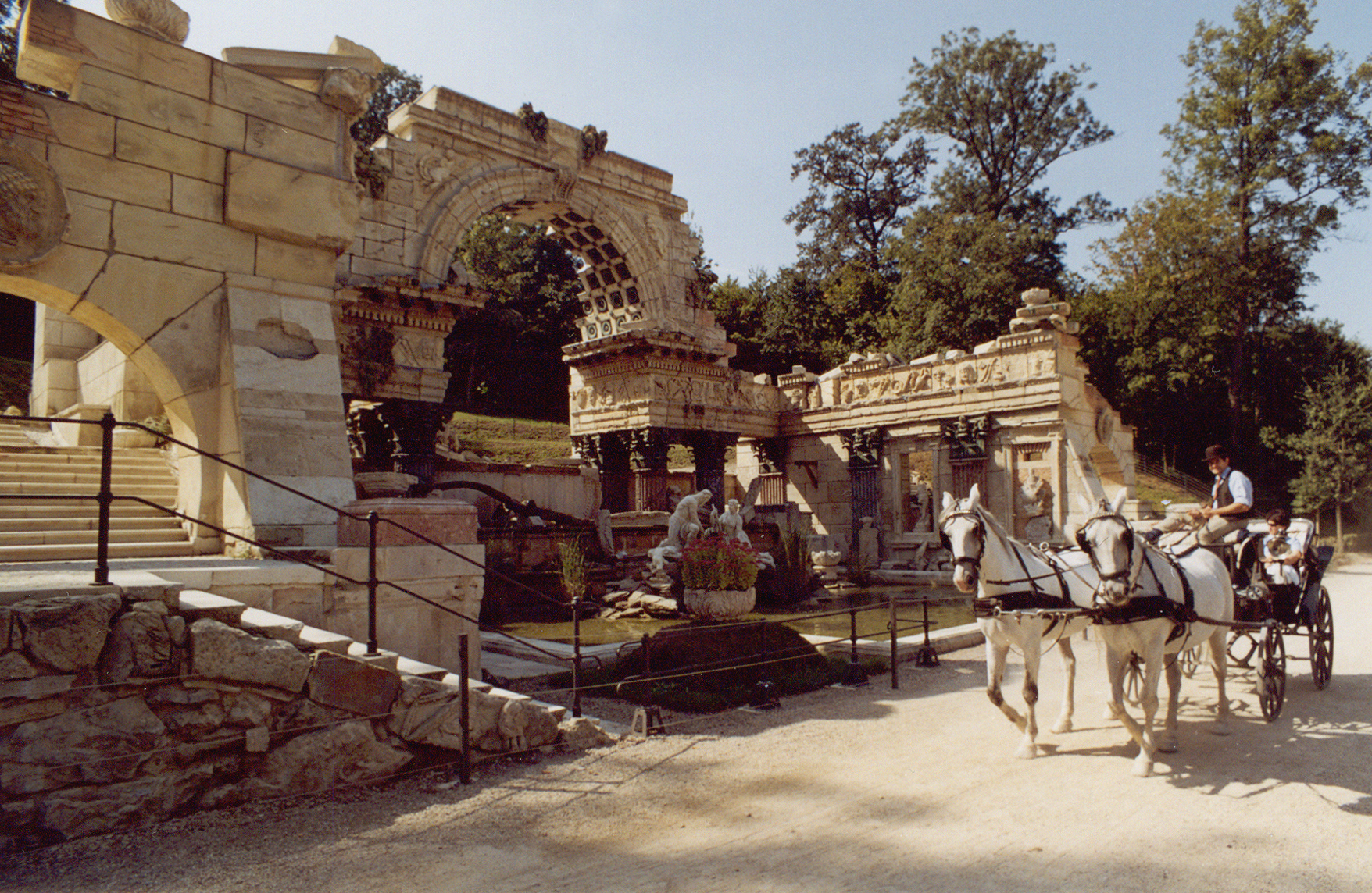 Roman ruins in Schönbrunn Palace's garden, Vienna